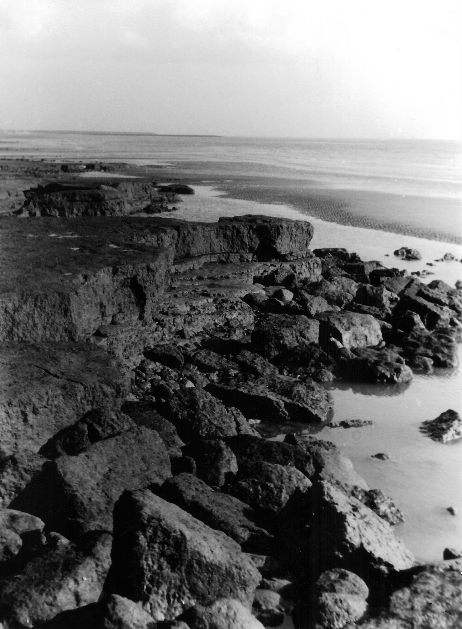 De Kaloot, Zuid Beveland, Netherlands; Schor